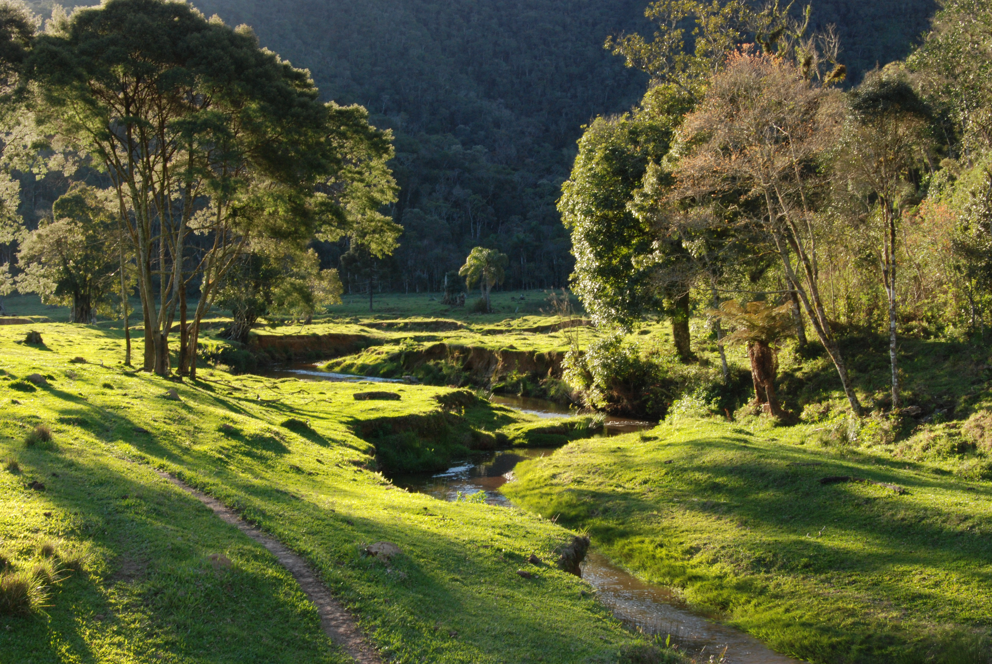 O Parque Nacional compreende uma área de 57.374 hectares e altitudes de 80 a 1.039 metros, abrangendo nove municípios (Indaial, Blumenau, Botuverá, Gaspar, Vidal Ramos, Apiúna, Guabiruba, Ascurra e Presidente Nereu).